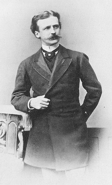 Йозеф Мария фон Радовиц